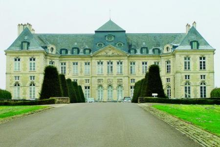 Ancien château devenu un hôpital psychiatrique